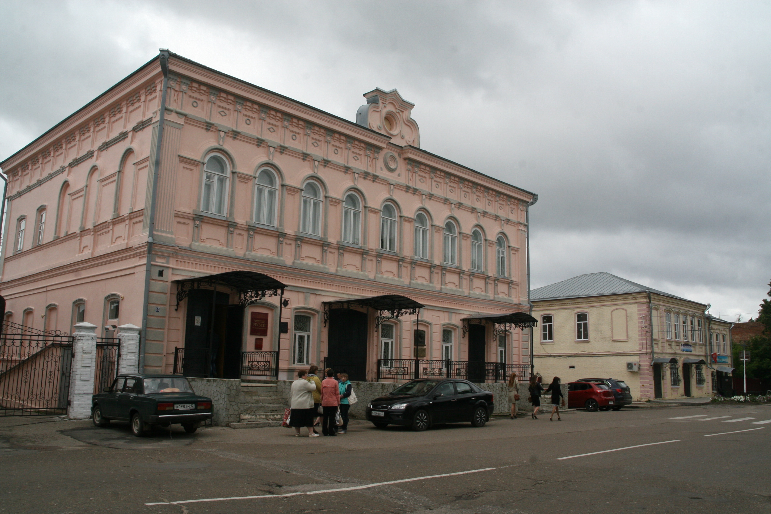 Главный дом усадьбы купца Пономарева (Республика Марий Эл, Козьмодемьянск, Лихачева улица, 10)